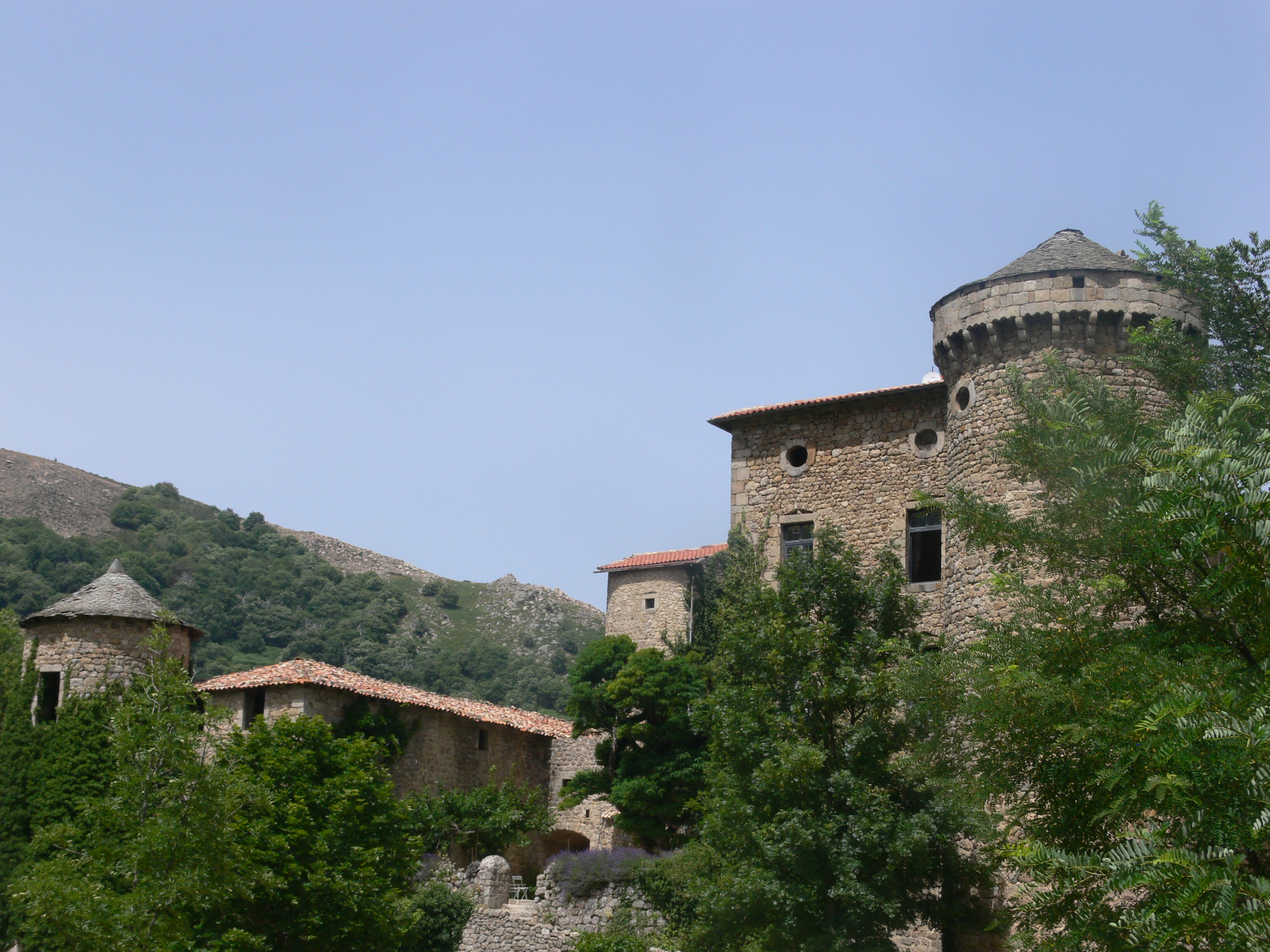 Saint-Pierreville - château Latour